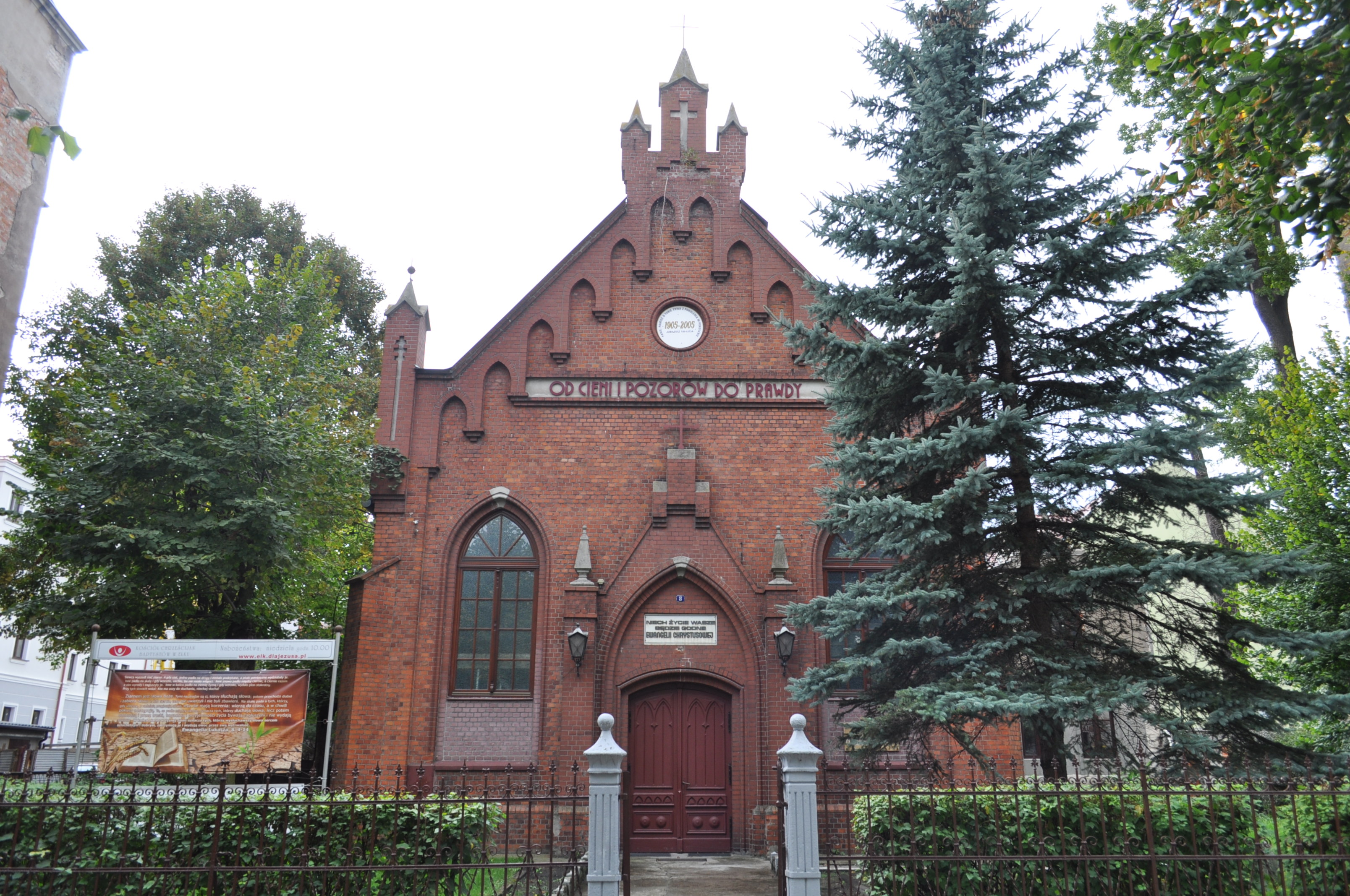 Kościół baptystów widok od frontu